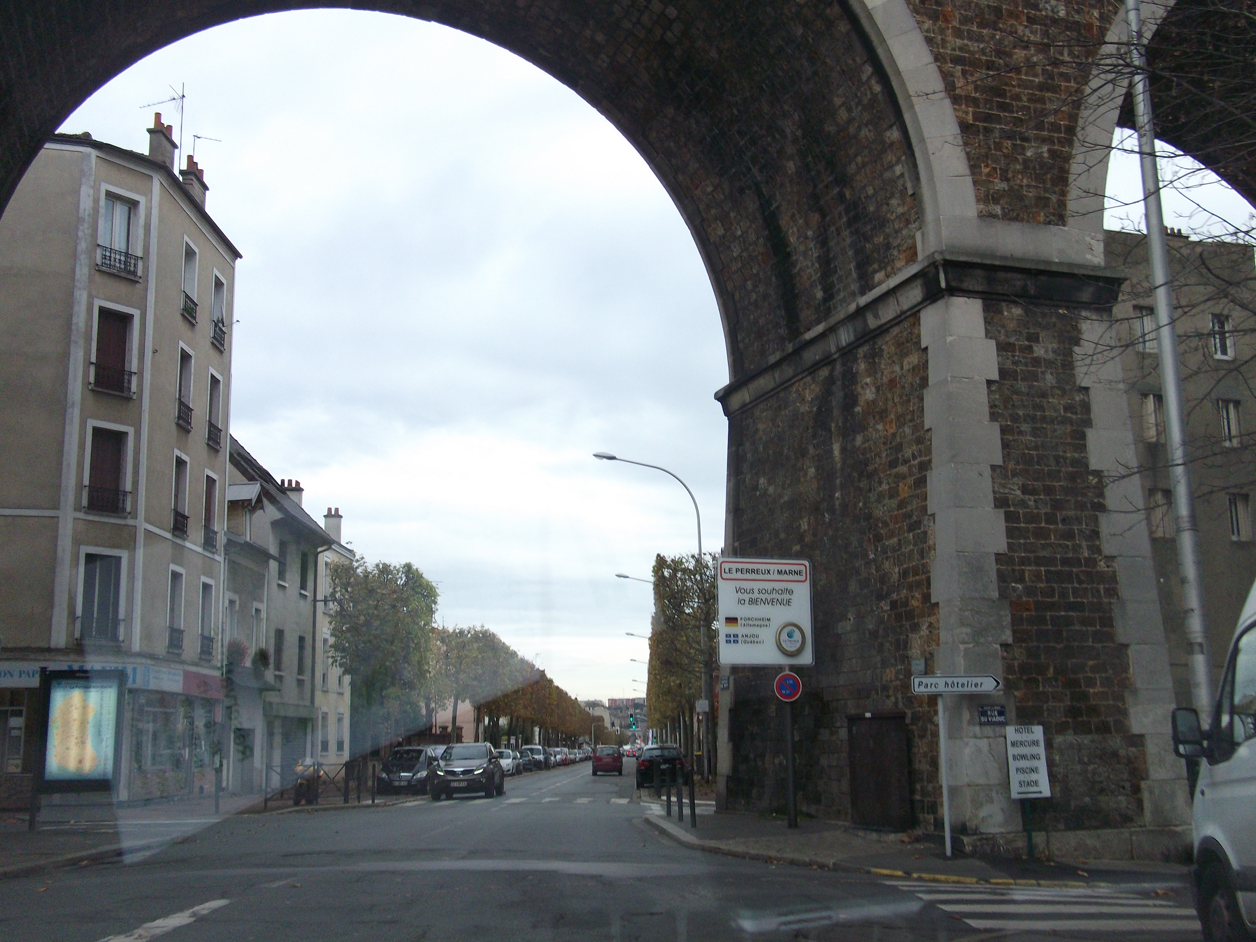 הכניסה לעיר לה-פרו-סור-מארן